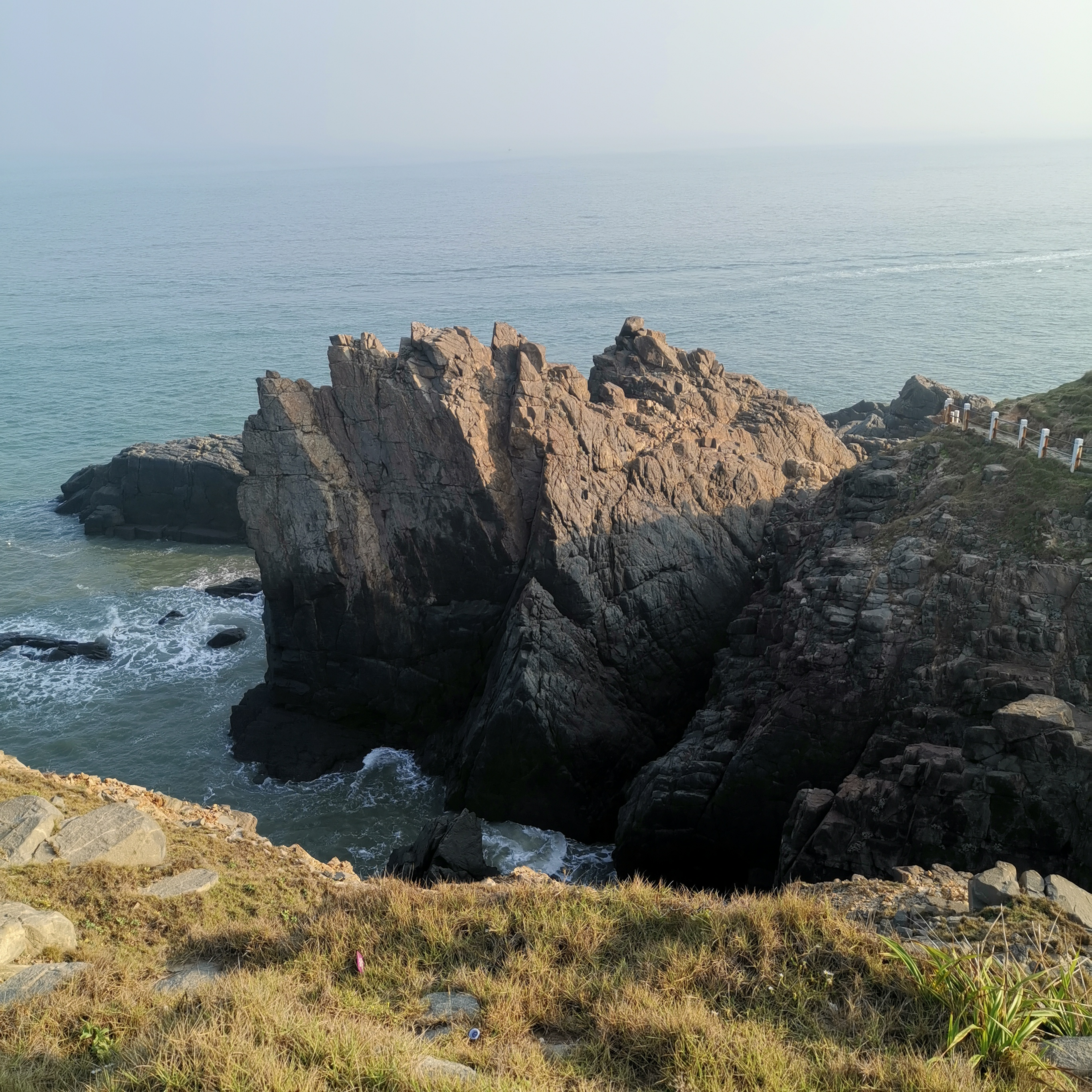 中文（中国大陆）: 仙人井